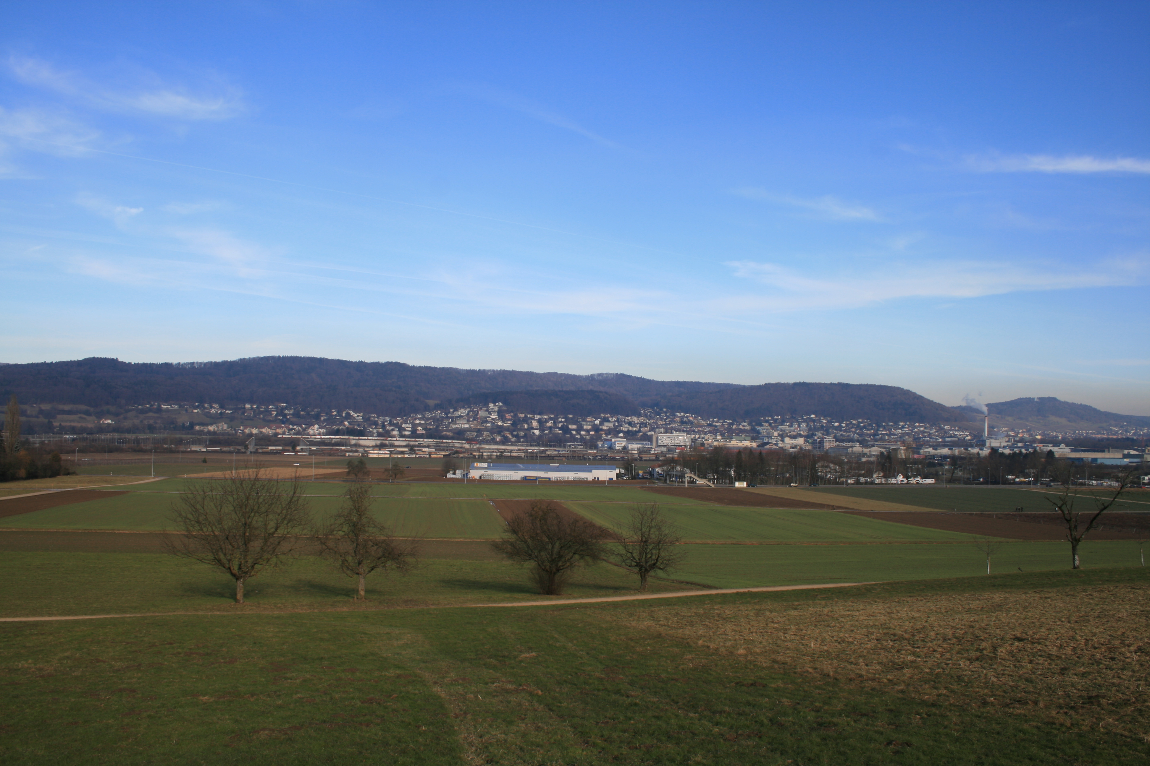 Limmattal, im Hintergrund Oettwil an der Limmat